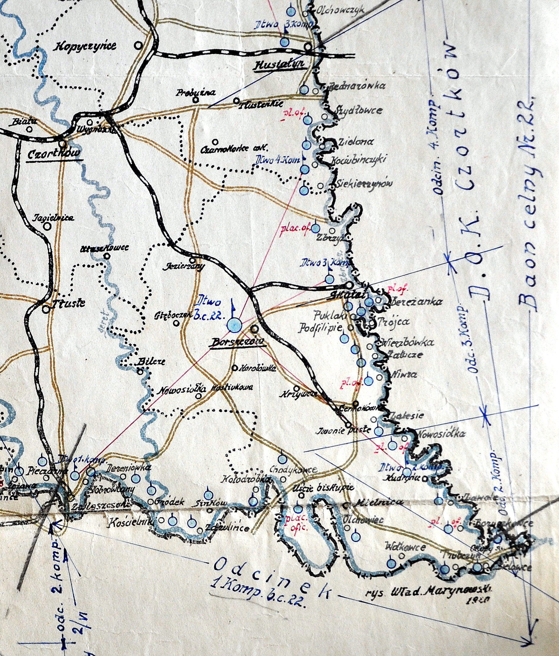 Szkic rozmieszczenia 22 batalionu celnego